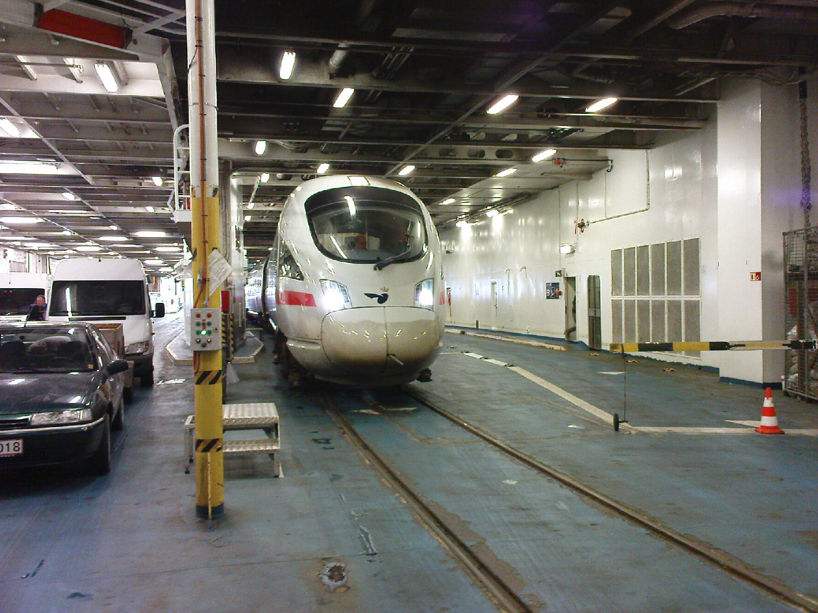 ICE Baureihe 605 befährt das FS "Deutschland" (Rødby/Puttgarden)